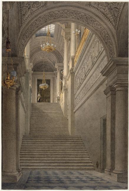 Palais des Tuileries : l'escalier neuf vu du vestibule